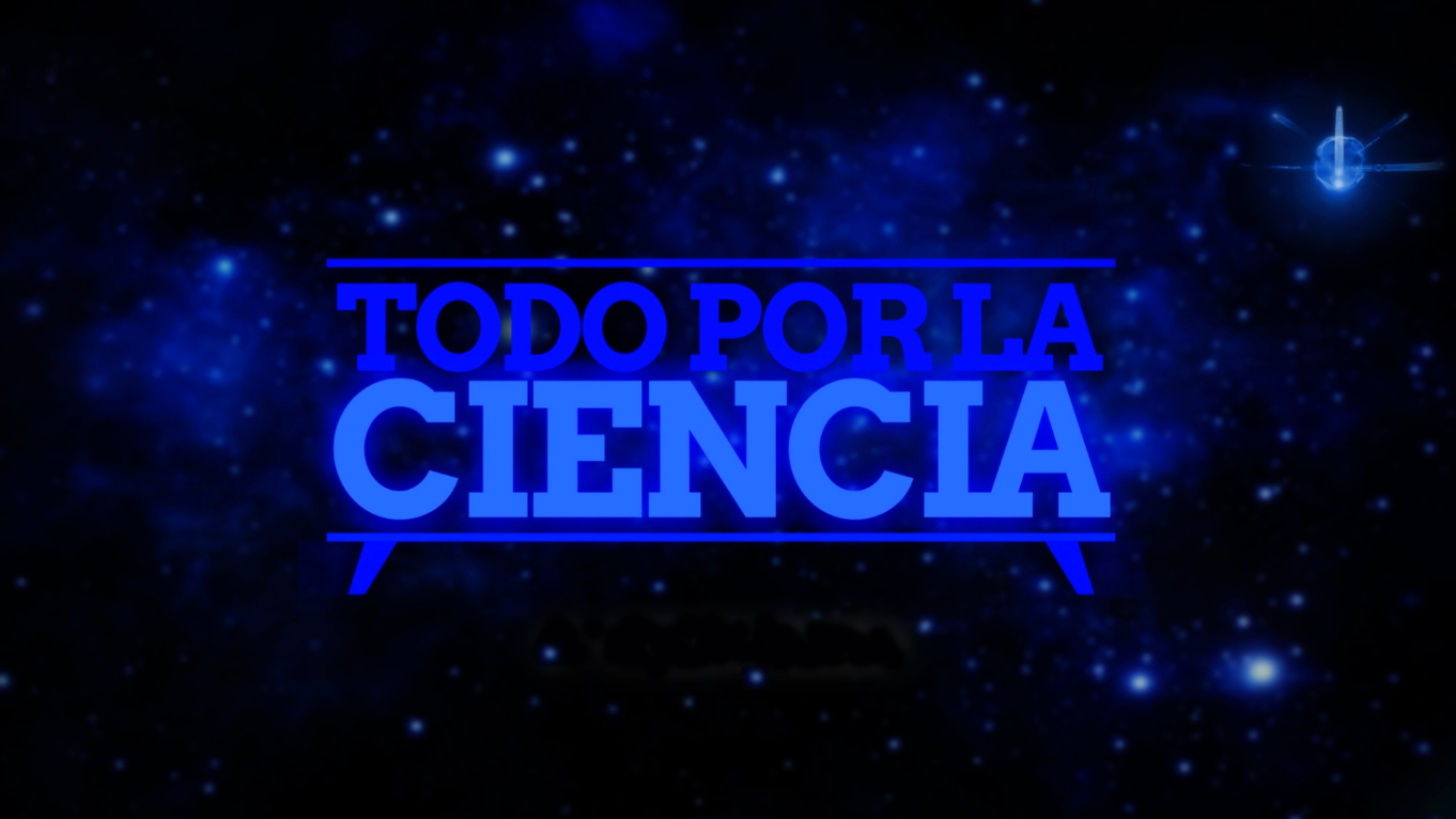 Logo del Programa